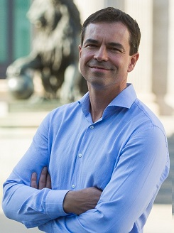 Andrés Herzog frente al Congreso de los Diputados